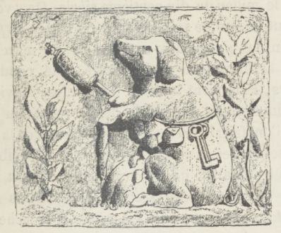 Bas-relief du XVIème siècle aujourd'hui conservé au musée de Cluny à Paris.